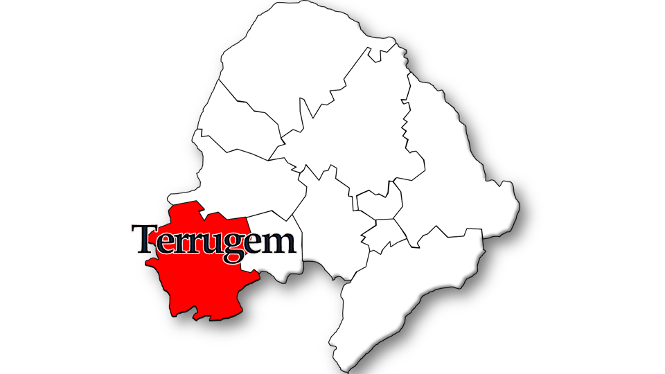 Evolução da População